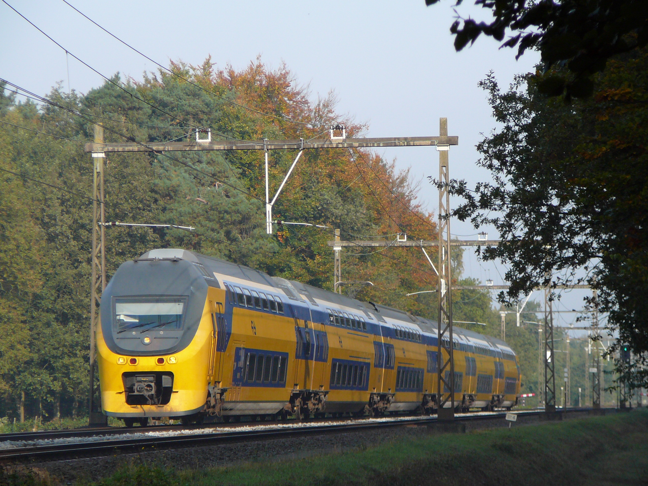 V-IRM bij Epse (NL)